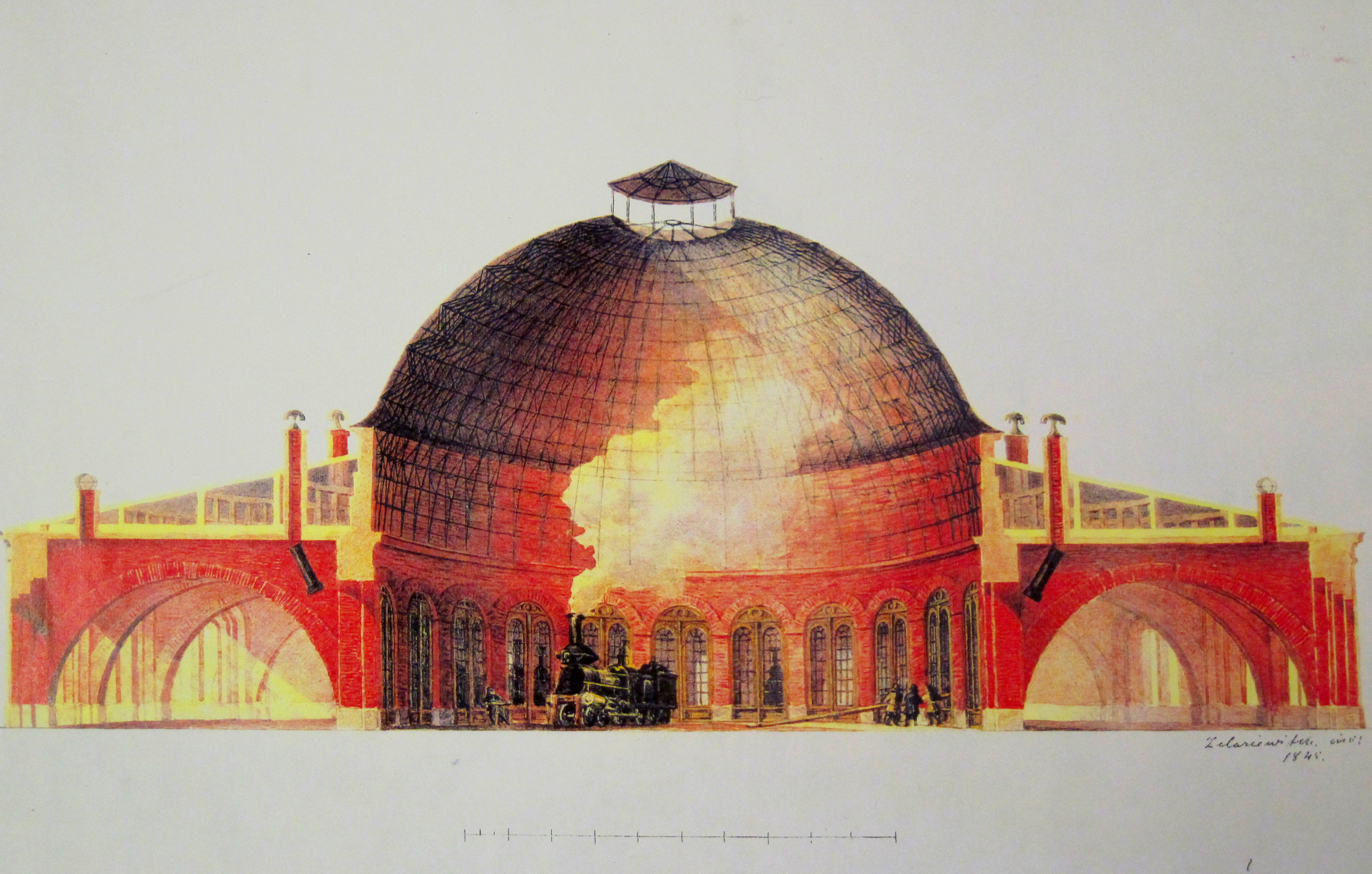 Разрез Кругового депо. Эскиз 1840-х годов.